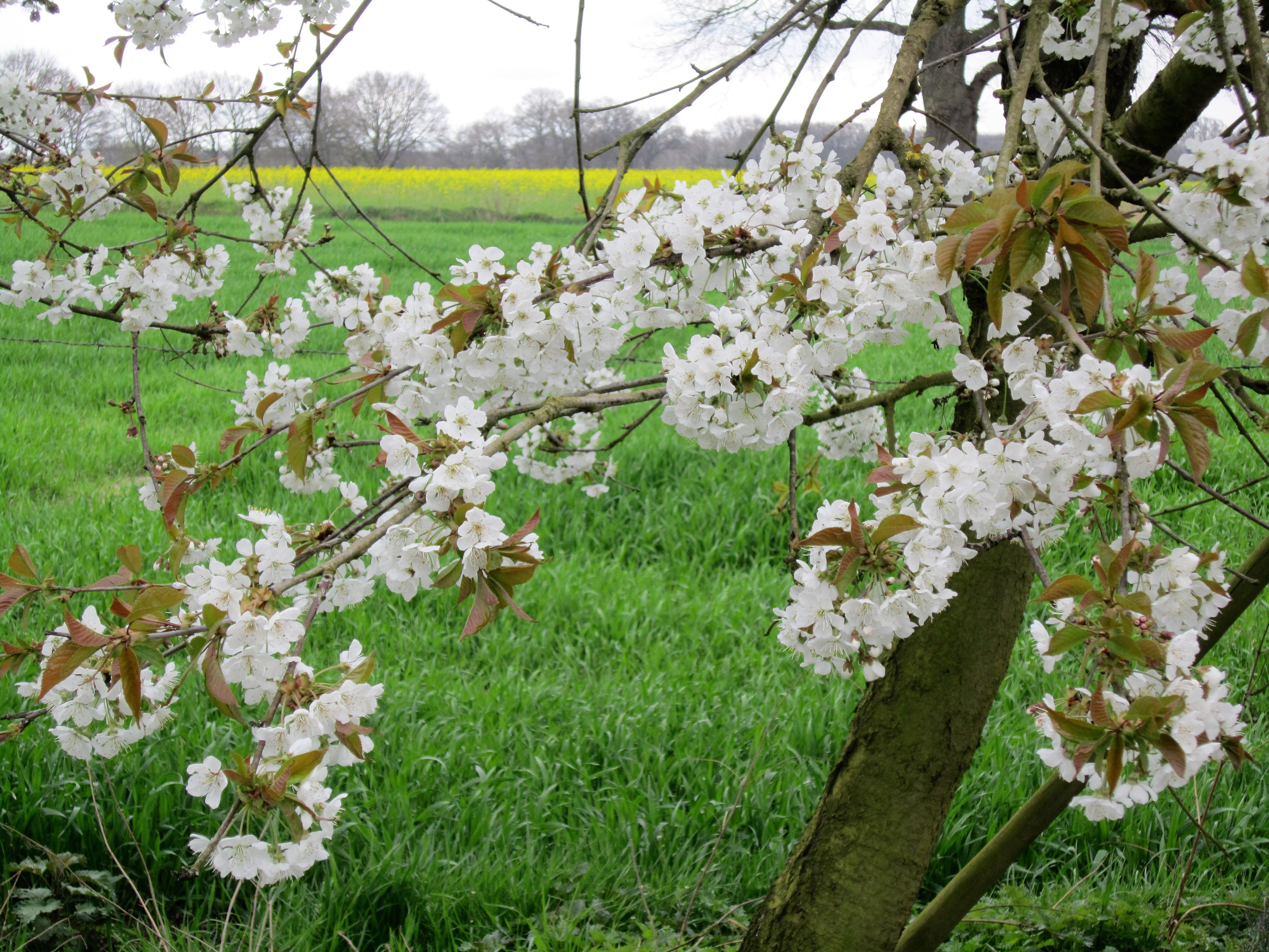 Im Oldenburger Münsterland gibt es nicht nur Massentierhaltung - Frühling im Dinklager Stadtteil Langwege